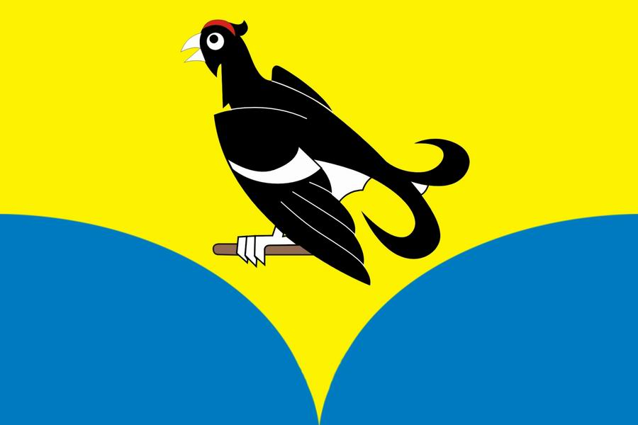 vlajka obce Přívrat